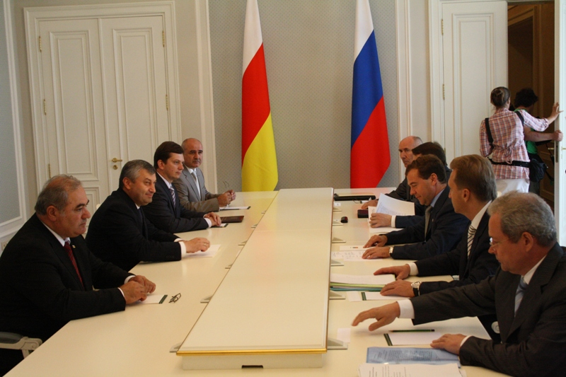 Эдуард Кокойты и Дмитрий Медведев обсуждают вопросы восстановления РЮО